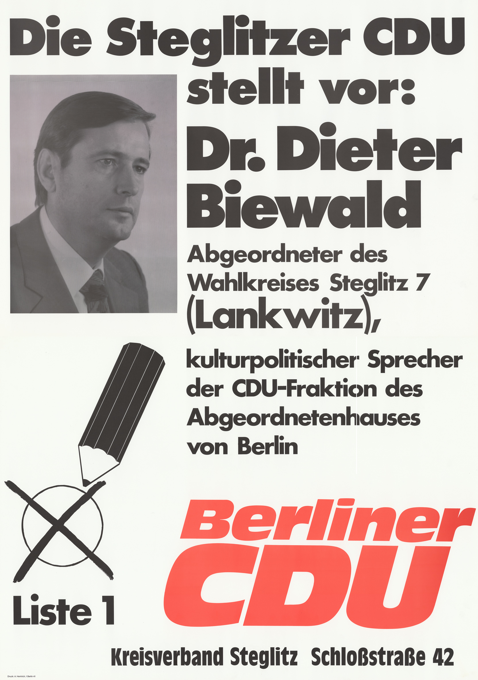 Die Steglitzer CDU stellt vor: Dr. Dieter Biewald ... kulturpolitischer Sprecher der CDU-Fraktion des Abgeordnetenhauses von Berlin Liste 1 Berliner CDU Kreisverband Steglitz ... Abbildung: Porträtfoto - Bleistift mit Stimmkreuz Kommentar: Zweiteiliges Plakat Plakatart: Kandidaten-/Personenplakat mit Porträt Auftraggeber: KV Steglitz Drucker_Druckart_Druckort: A. Hentrich, Berlin-Steglitz Objekt-Signatur: 10-004 : 533 Bestand: Plakate zu Abgeordnetenhauswahlen Berlin (10-004) GliederungBestand10-18: Plakate zu Abgeordnetenhauswahlen Berlin (10-004) » CDU Lizenz: KAS/ACDP 10-004 : 533 CC-BY-SA 3.0 DE